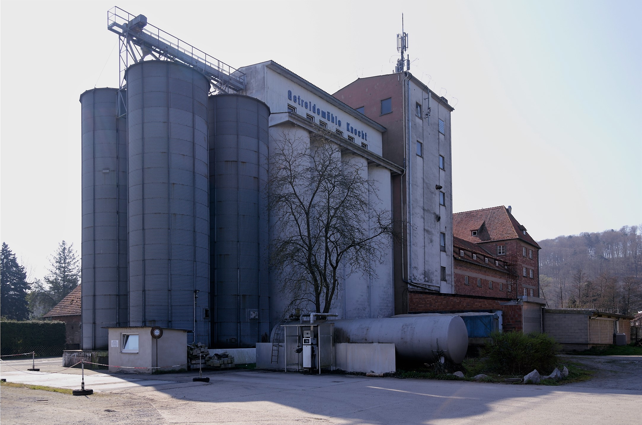 Getreidemühle Knecht in Obernburg am Main, Stadtteil Eisenbach, in Bayern, Deutschland.